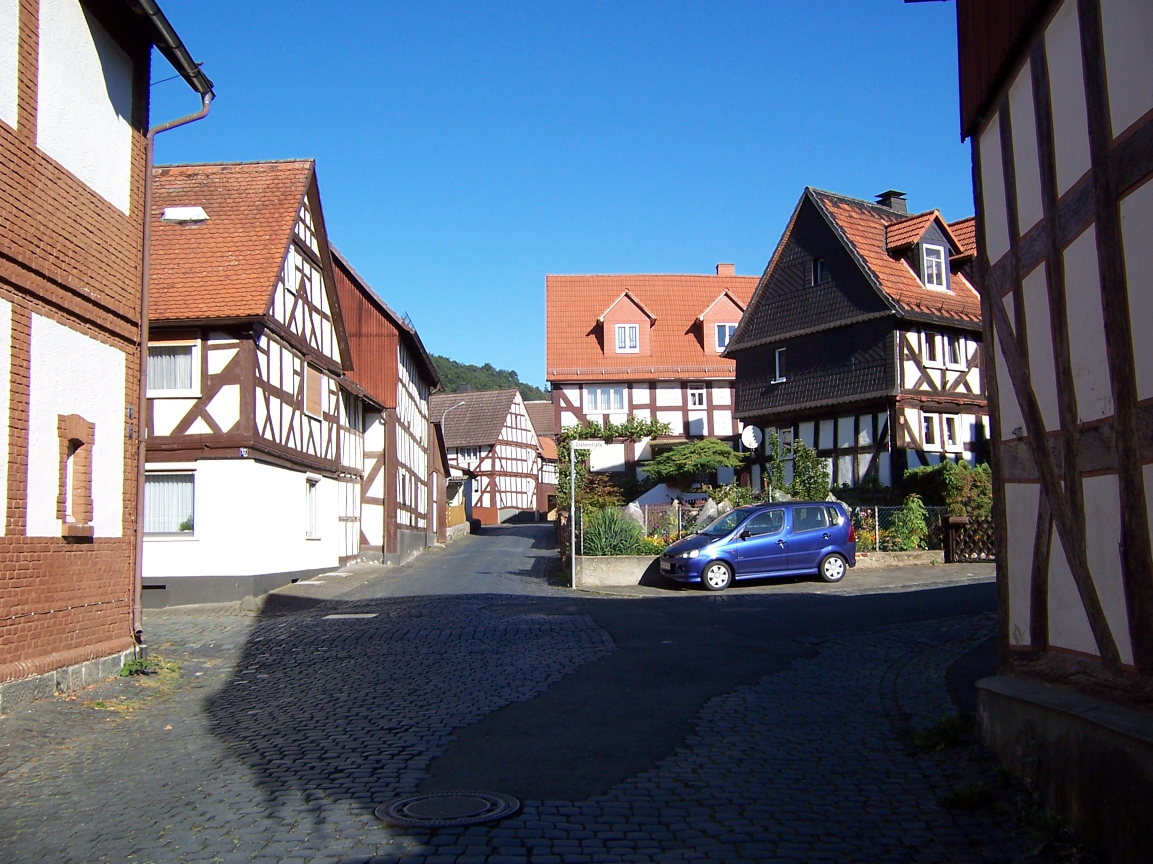 Alte Fachwerkhäuser im Ortskern von Buchenau (Blick in Richtung Bachstraße). Teilweise 17. Jahrhundert.